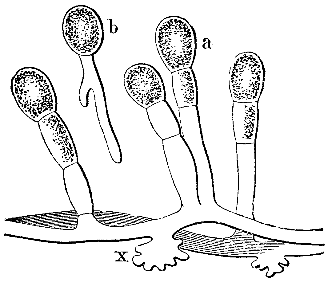 Slika 342. Trtna jajčasta plesen. (Oídium Tuckéri.) [sic!]